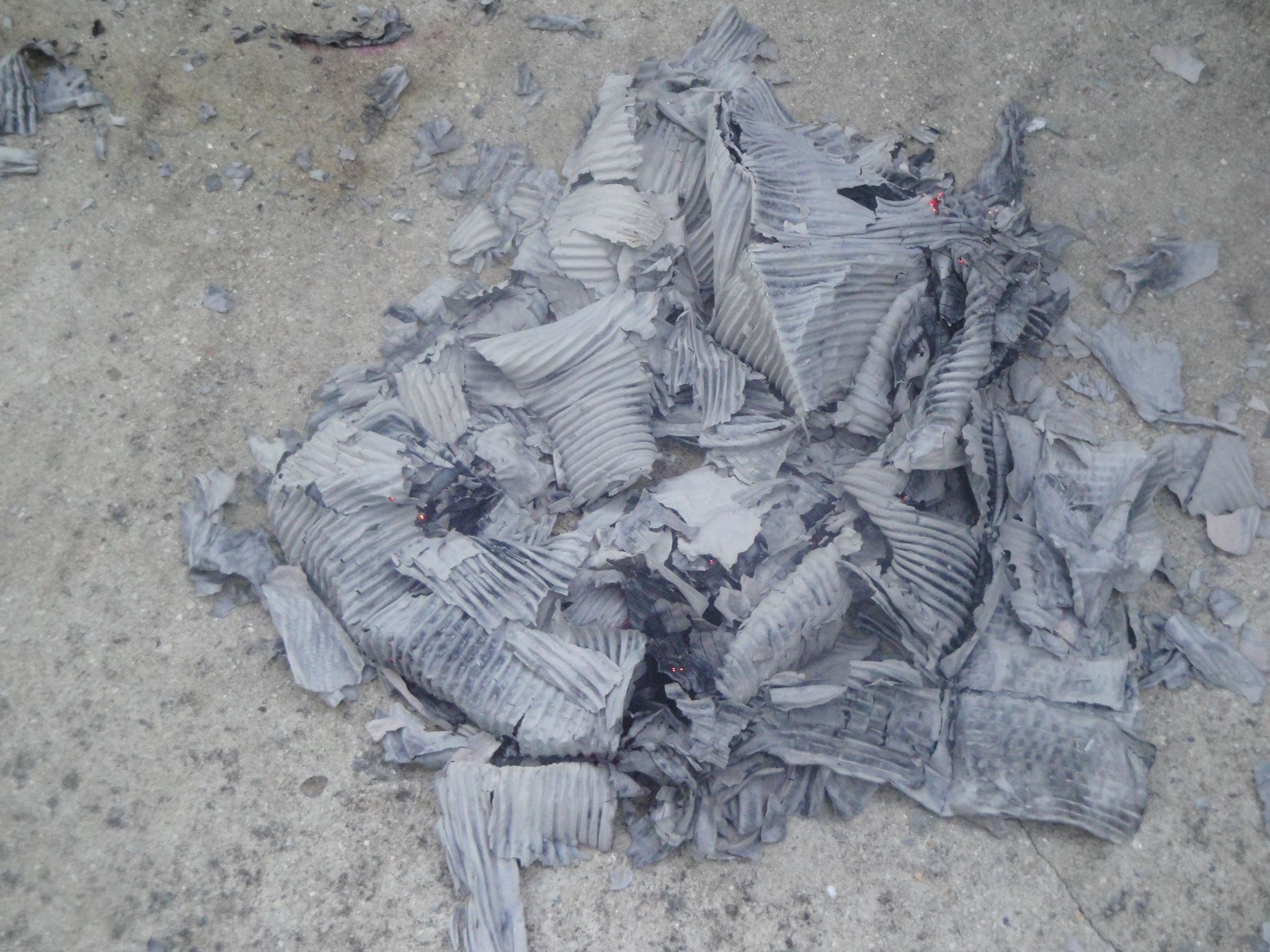 Cinzas de uma caixa de papelão.